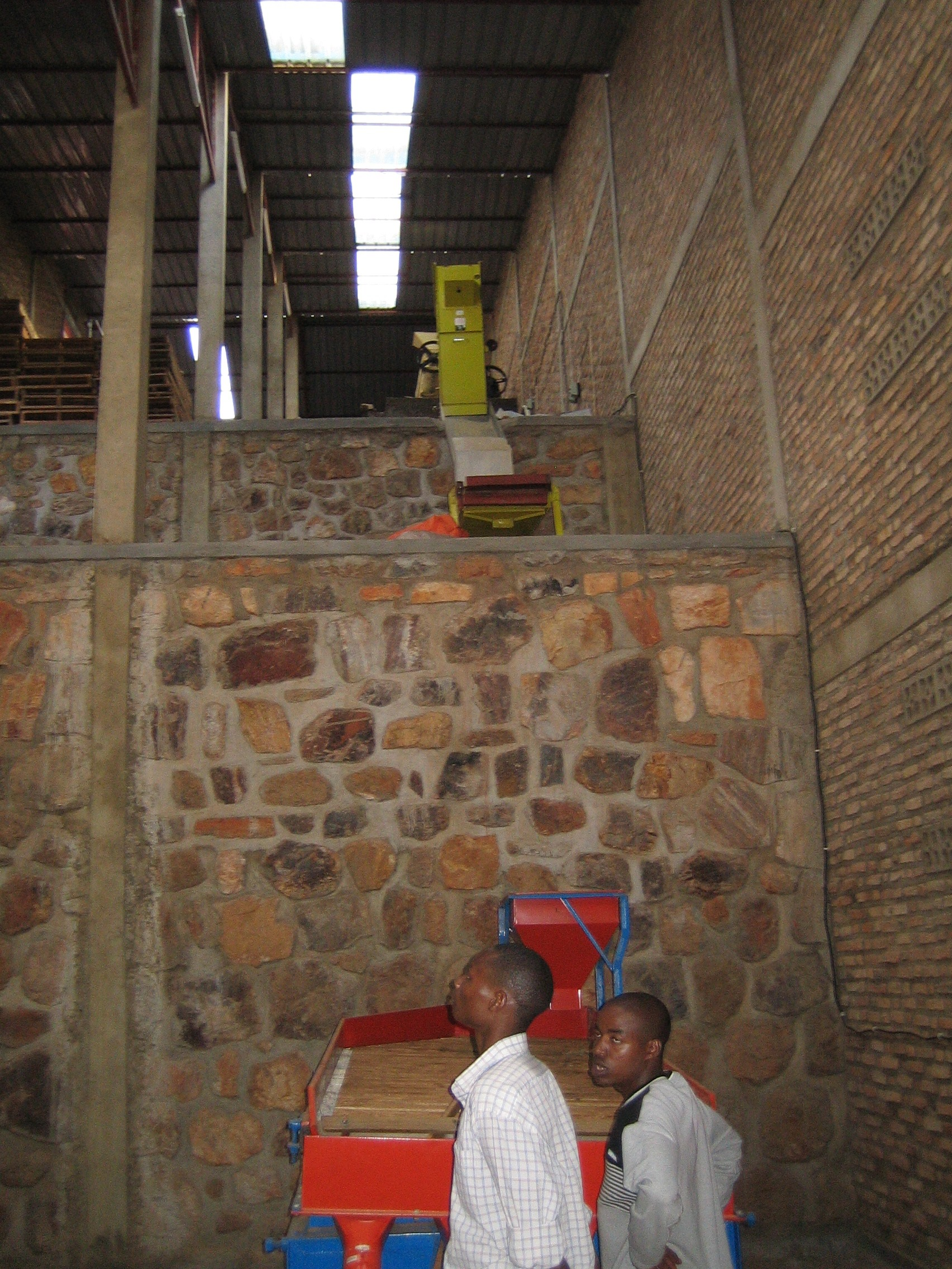 Taken by SteveRwanda